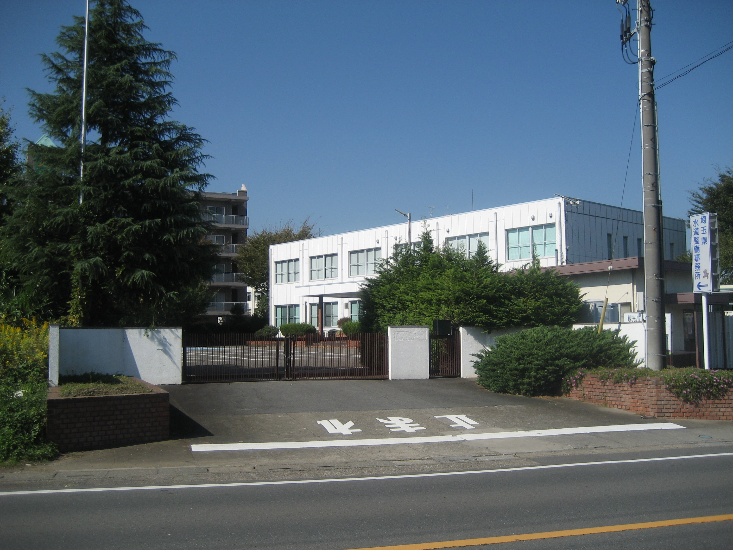 埼玉県さいたま市桜区に所在する埼玉県企業局水道整備事務所庁舎